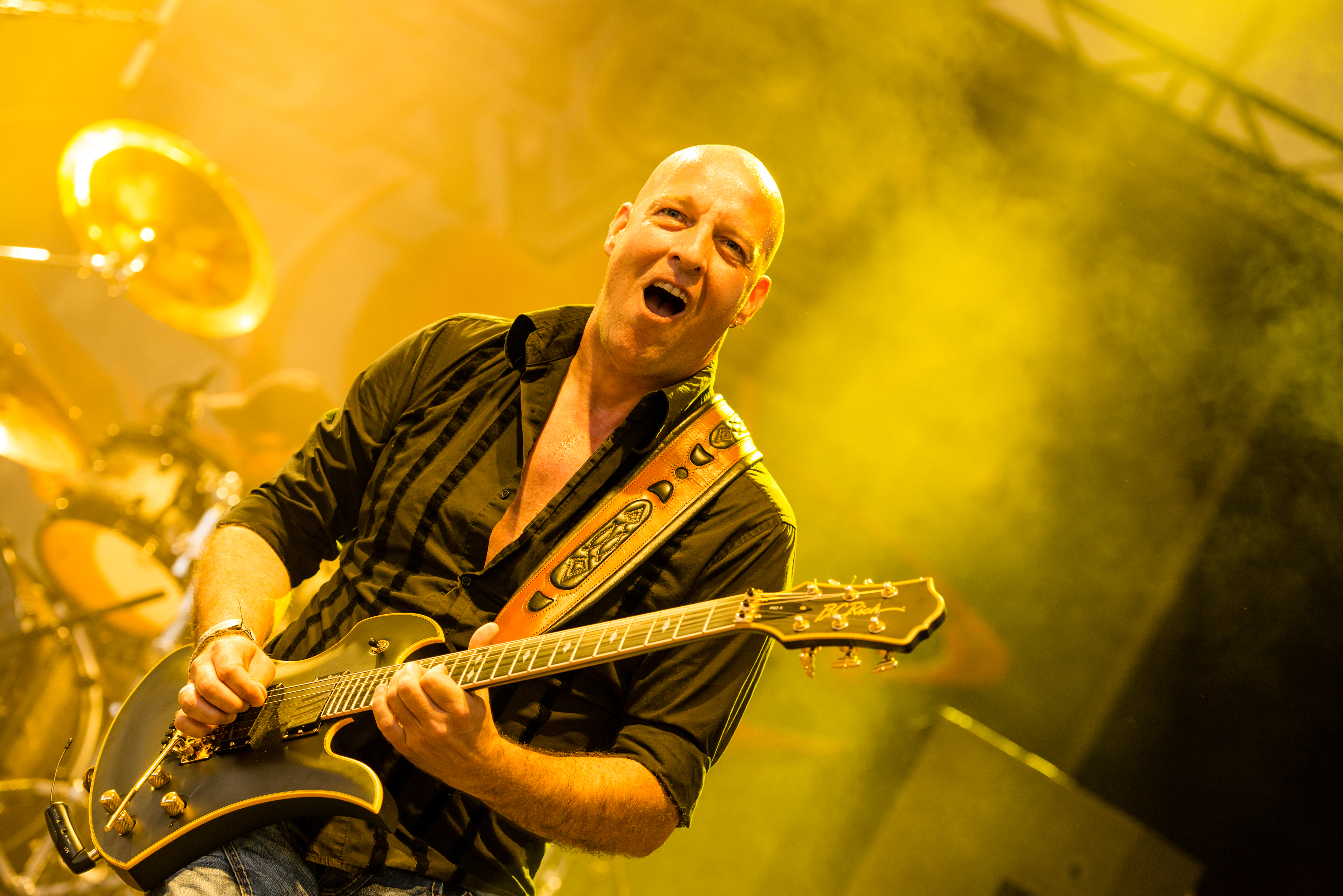 'Rock Hard Festival 2014 - Gelsenkirchen': 'Iron Savior'